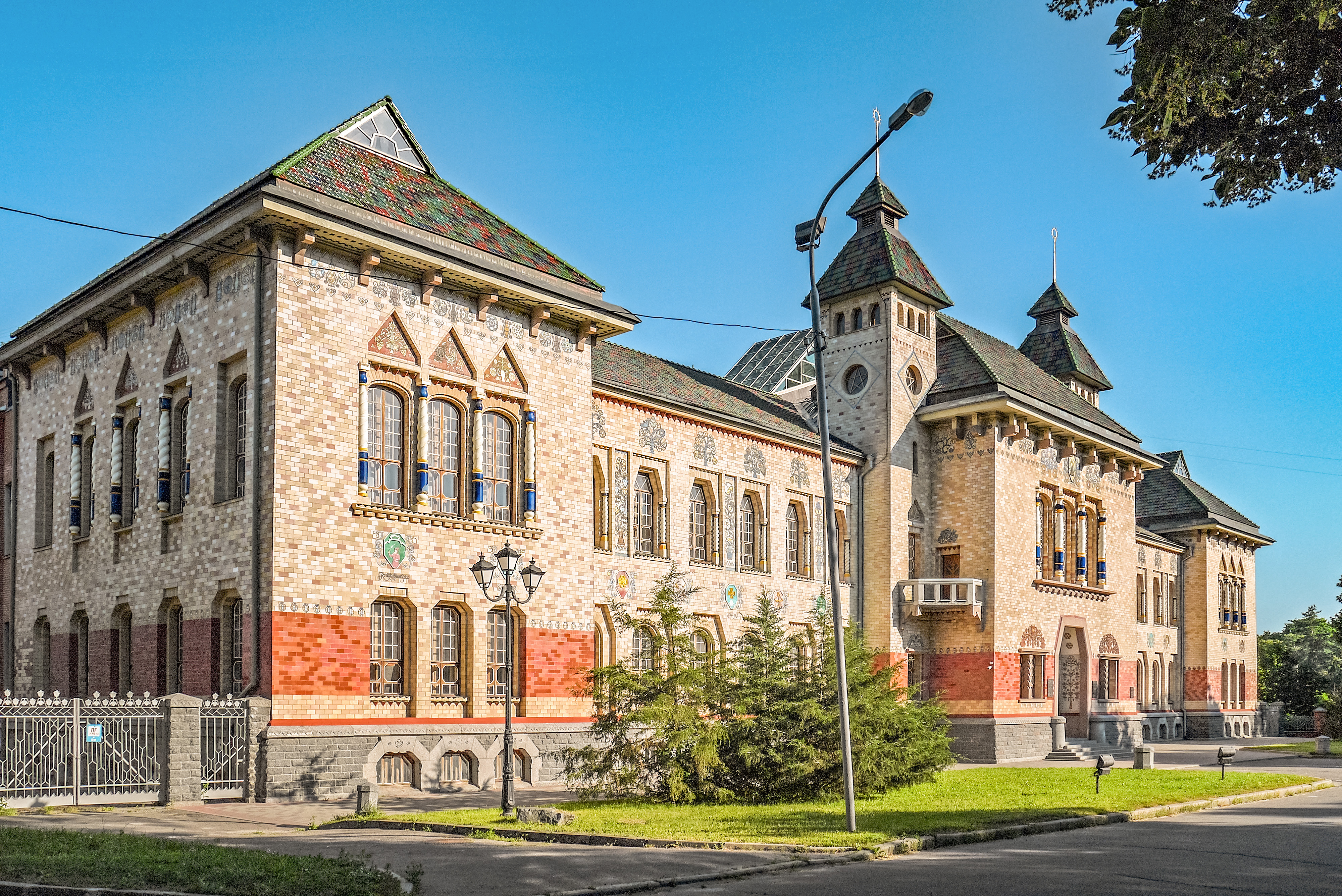 Будинок земства, Полтава, пл. Конституції, 2